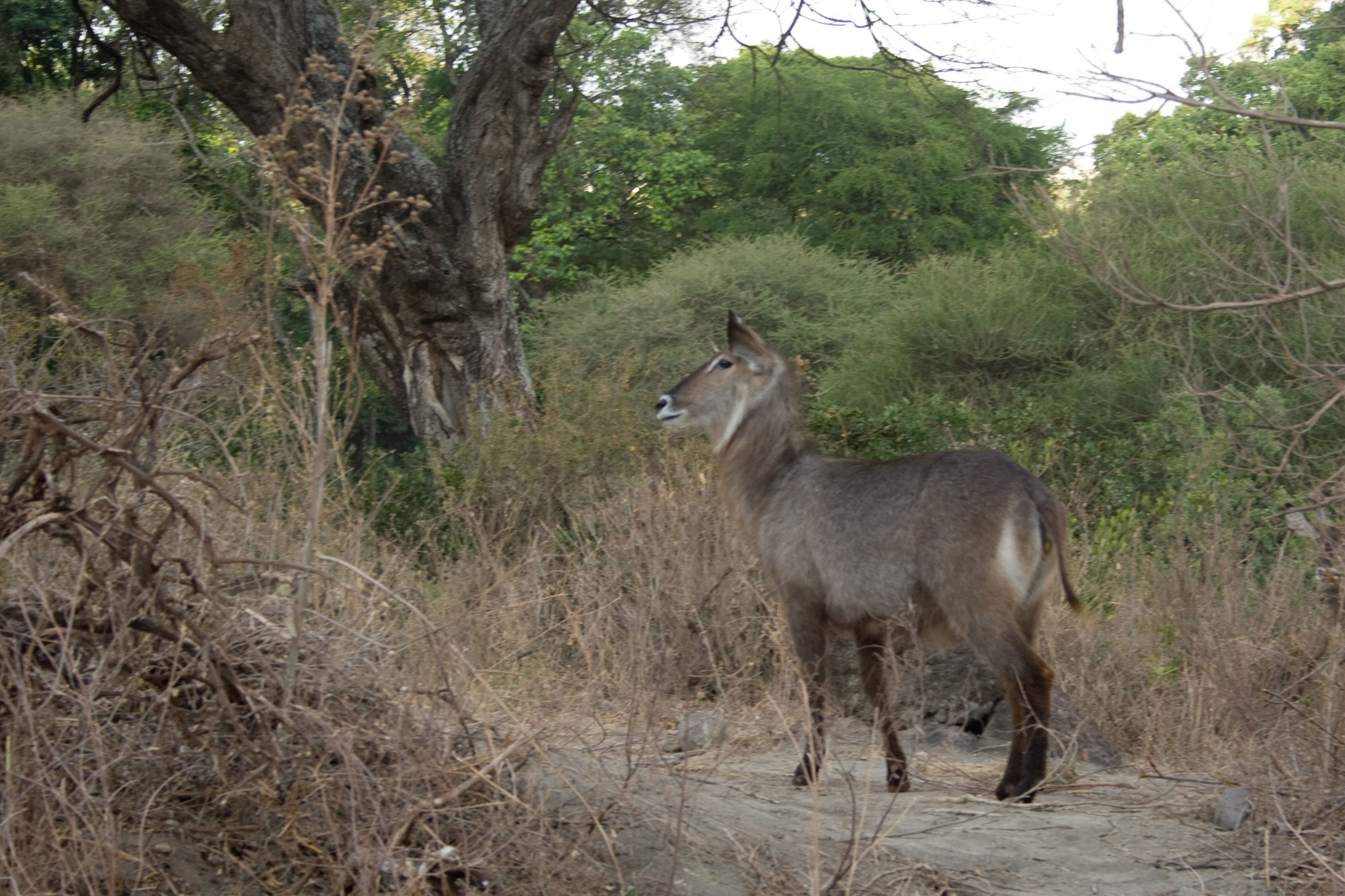 Waterbuck, Lake Manyara national park, Tanzania.